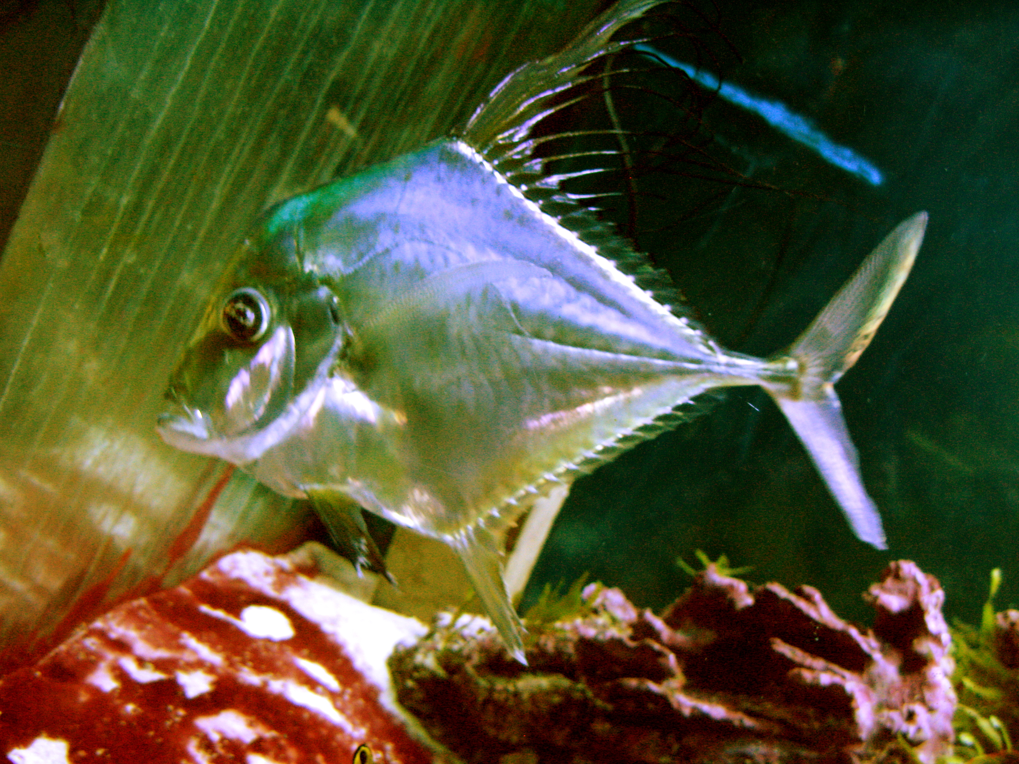 Alectis indica